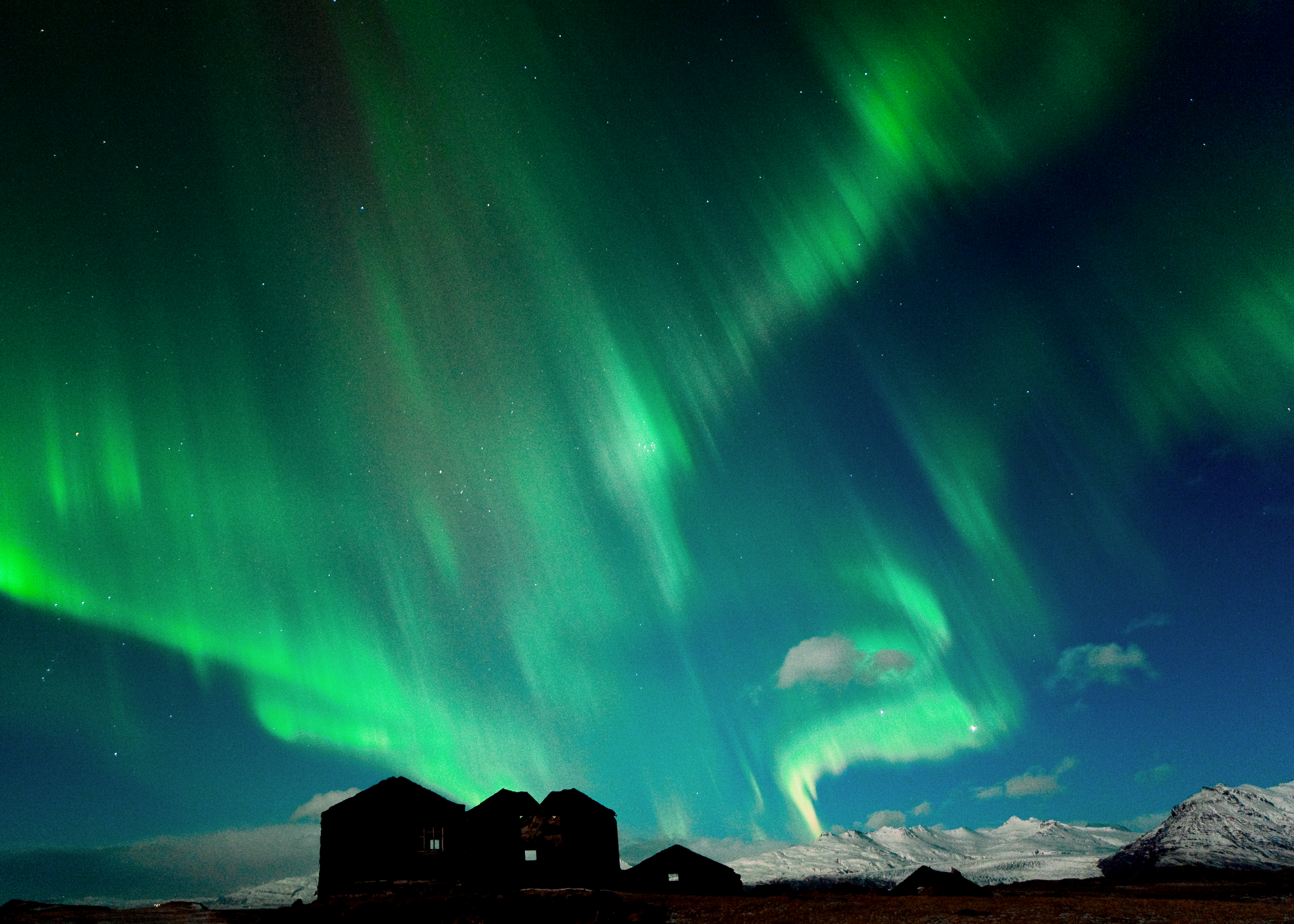 Aurora Island